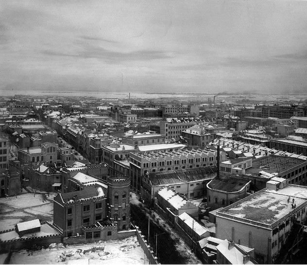 赤峰道旧影